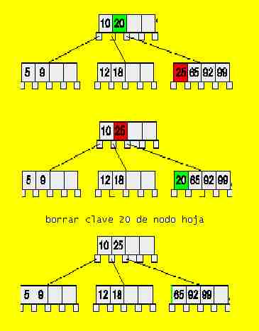 dibujo de elimina un nodo intermedio